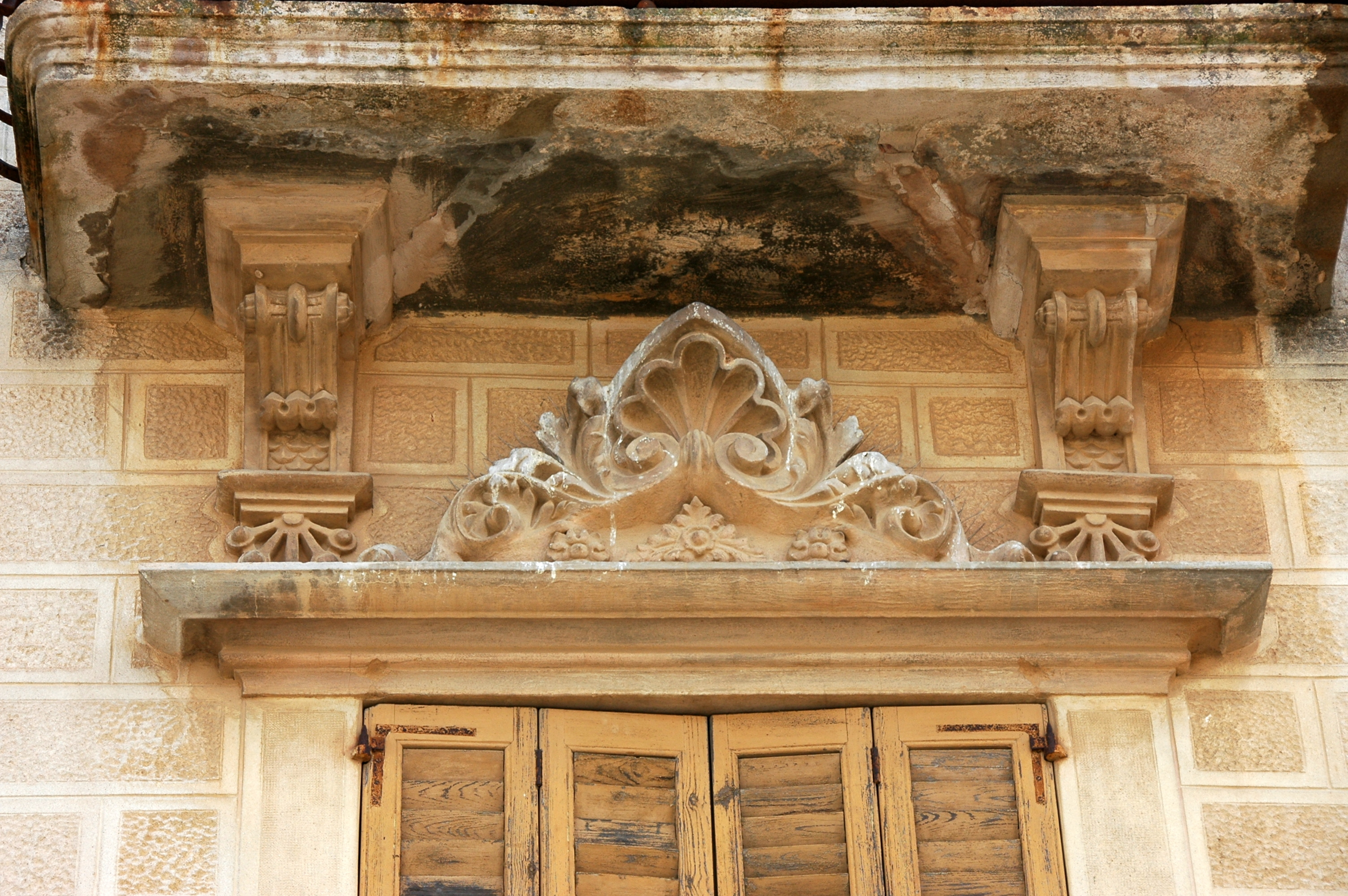 Casa unifamiliar al carrer de Sant Ramon, 7 (Palafrugell)